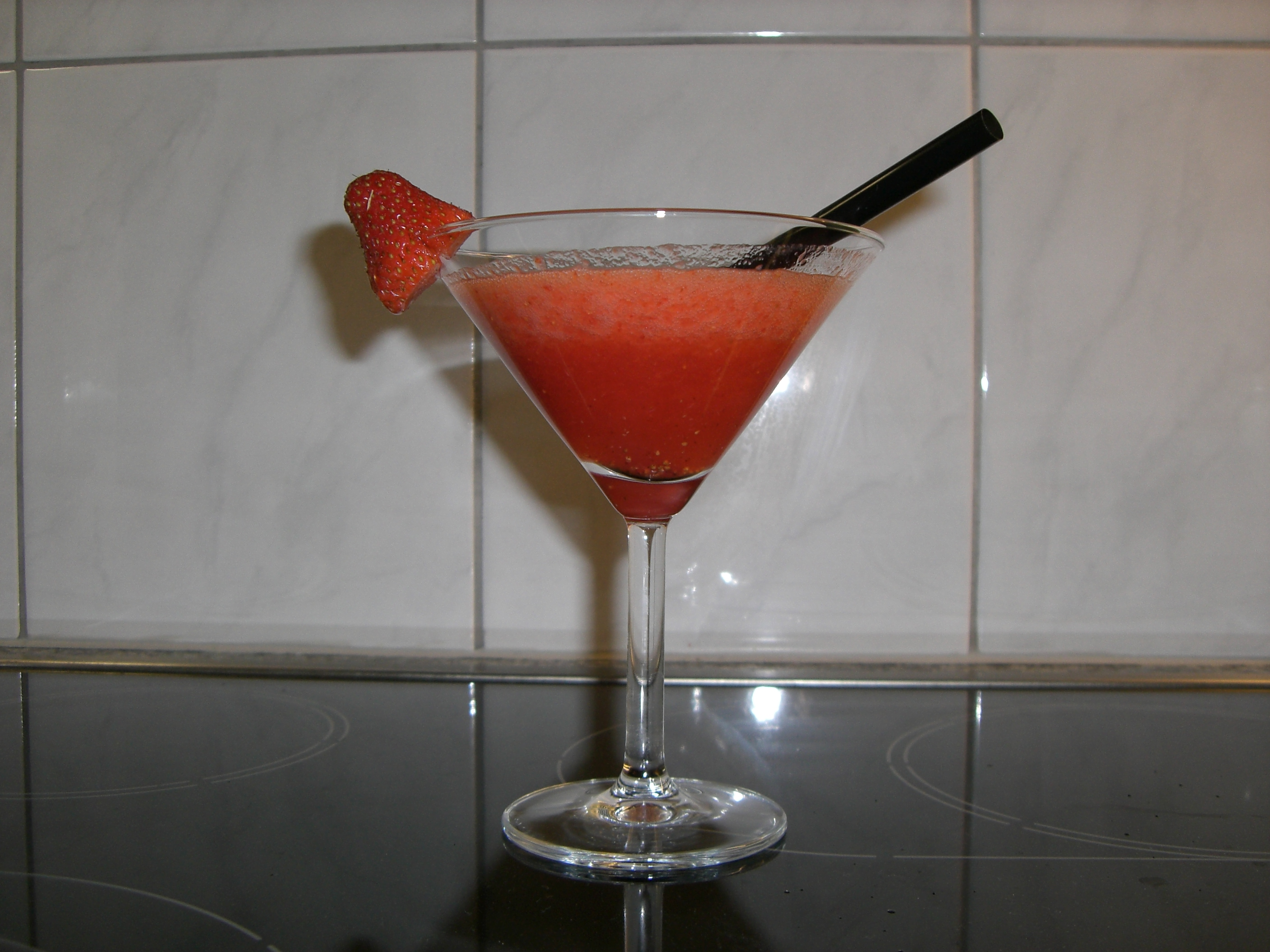 Strawberry Daiquiri aus echten Erdbeeren